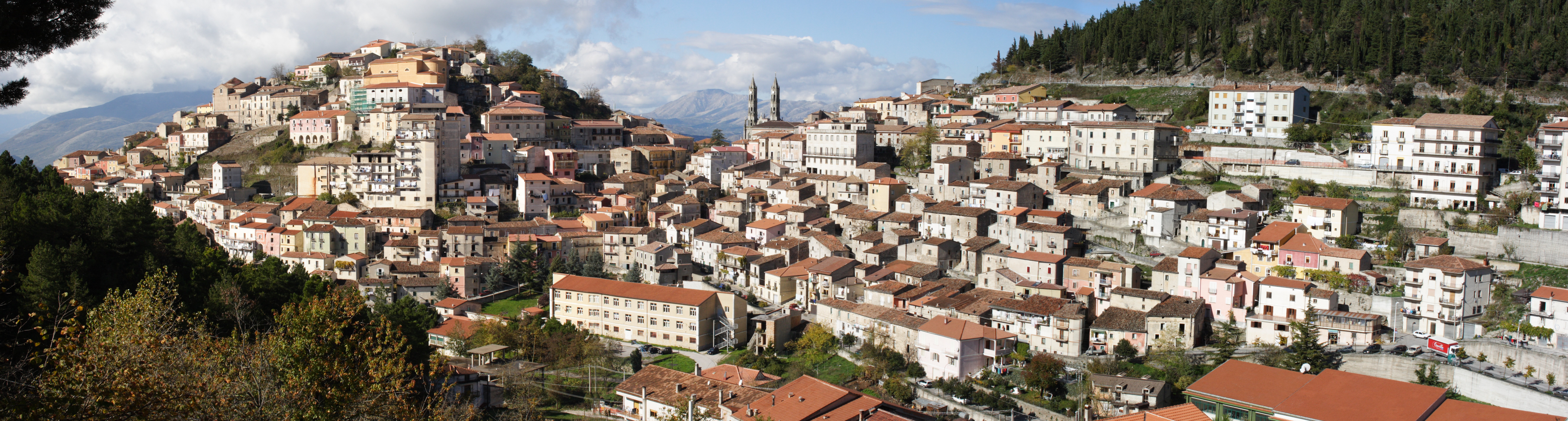 Panoramica di Montesano sulla Marcellana